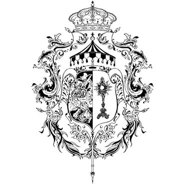 Emblema da RVISSM